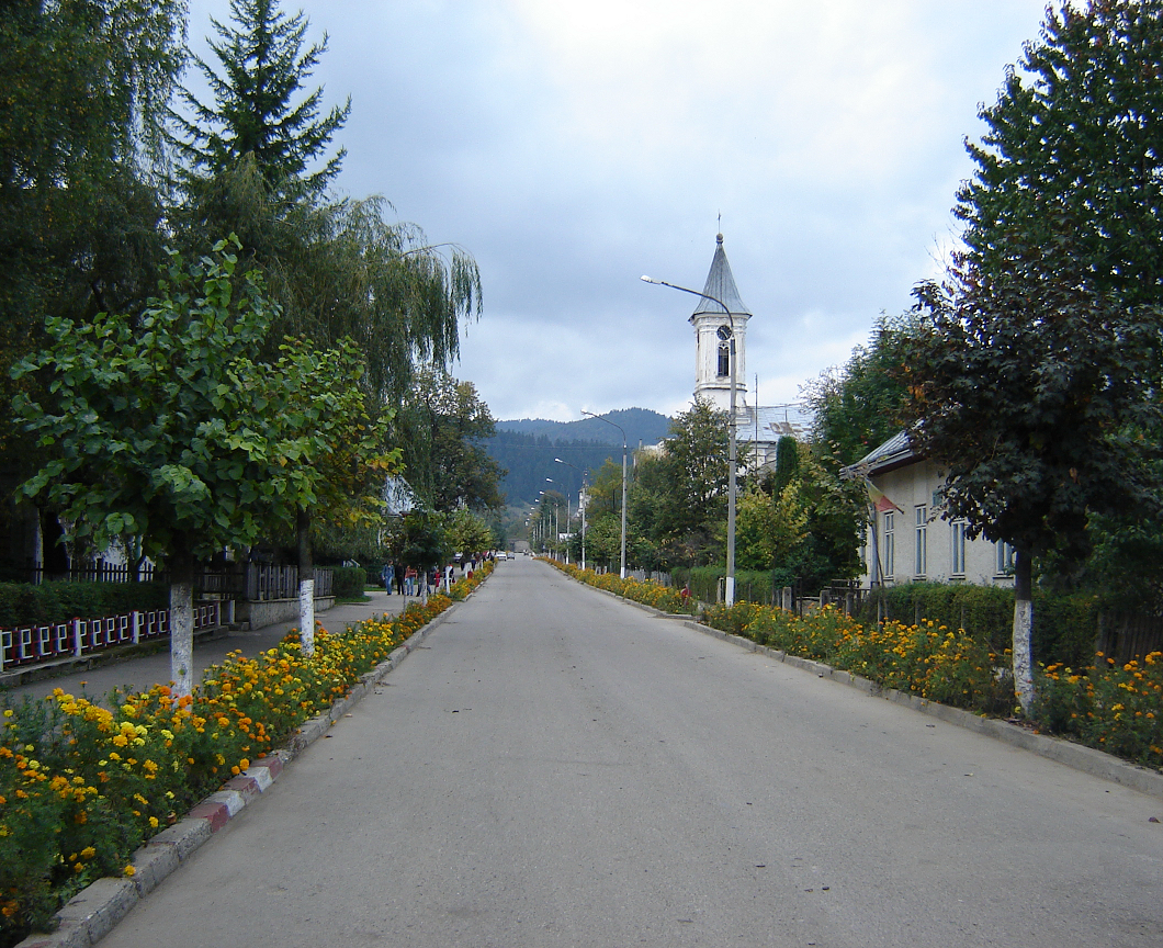 Strada Tomşa Vodă din centrul oraşului Solca